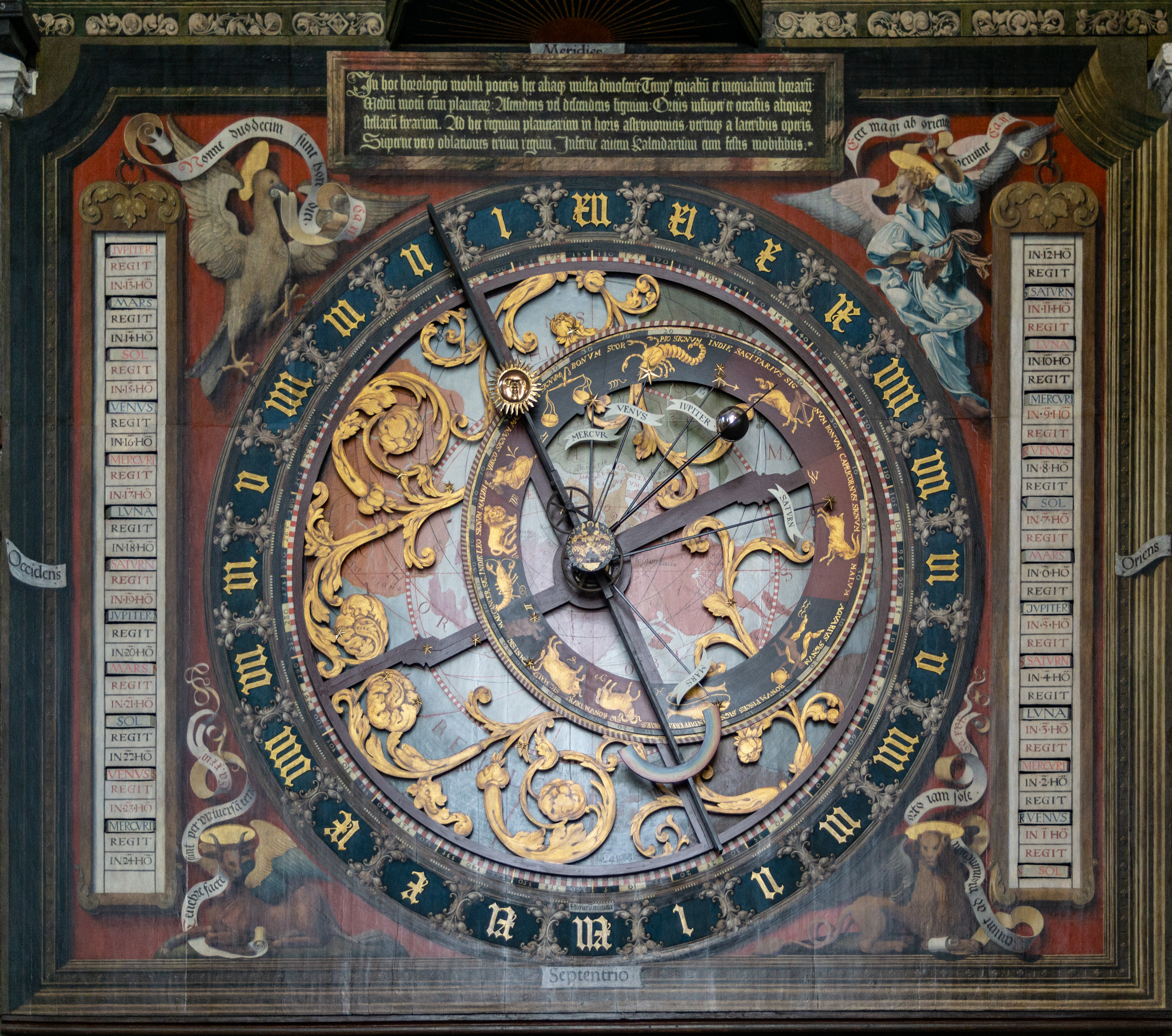 St.-Paulus-Dom_(Münster): Astronomische Uhr